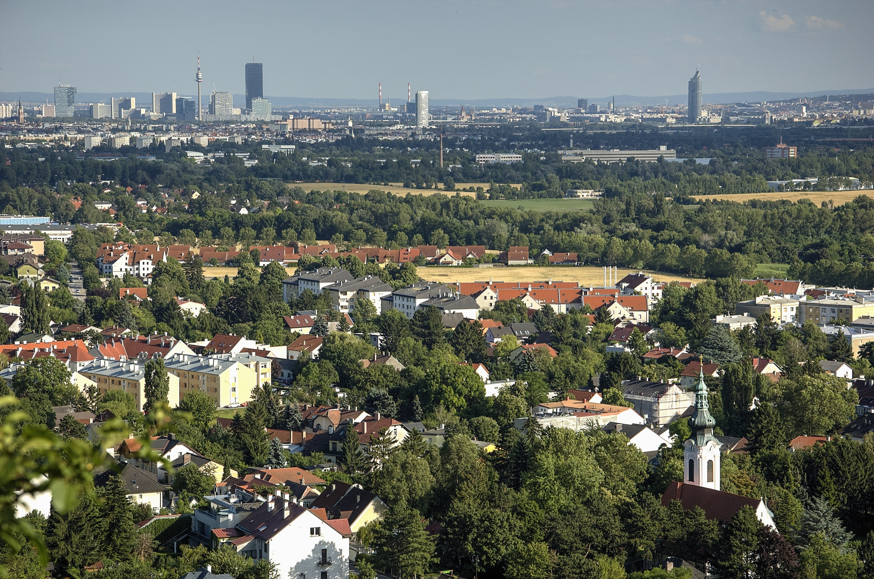 Wien vom Bisamberg